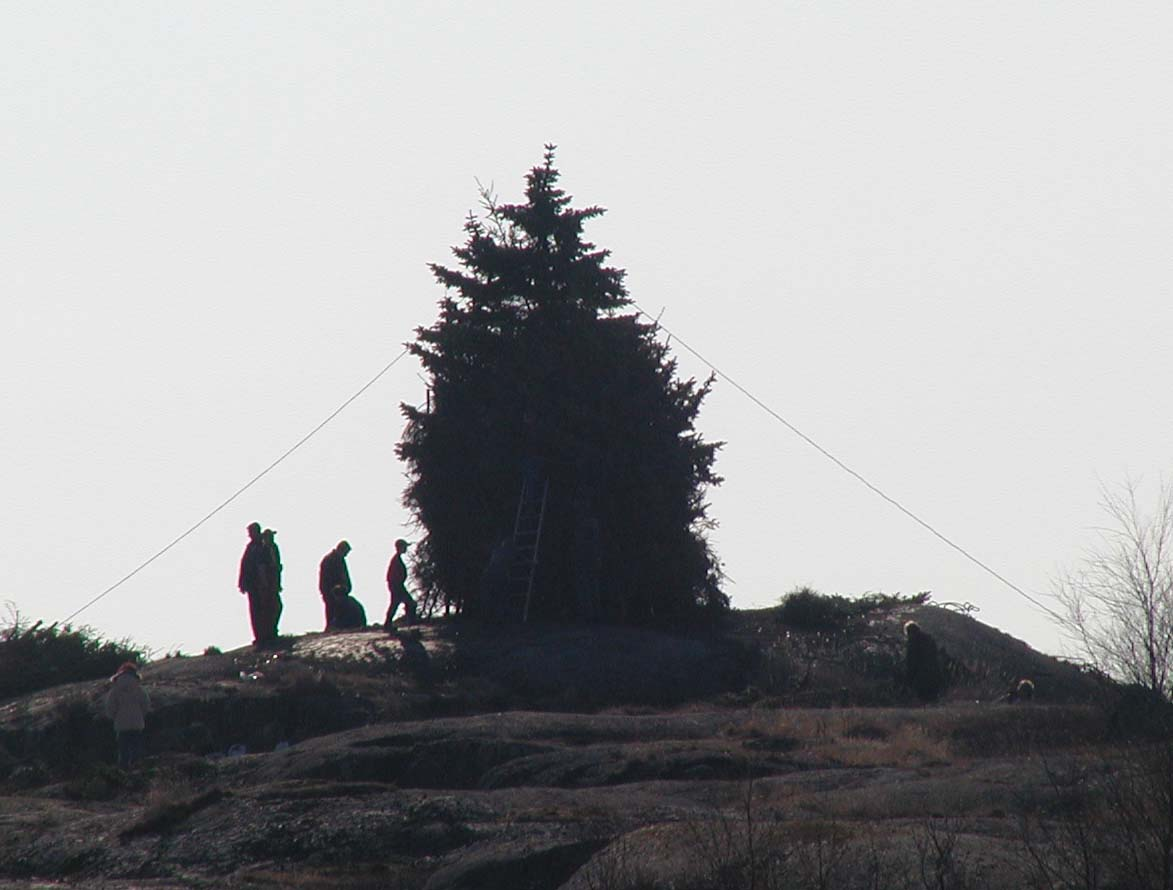 Påskbrasa förbereds, Hönö2003